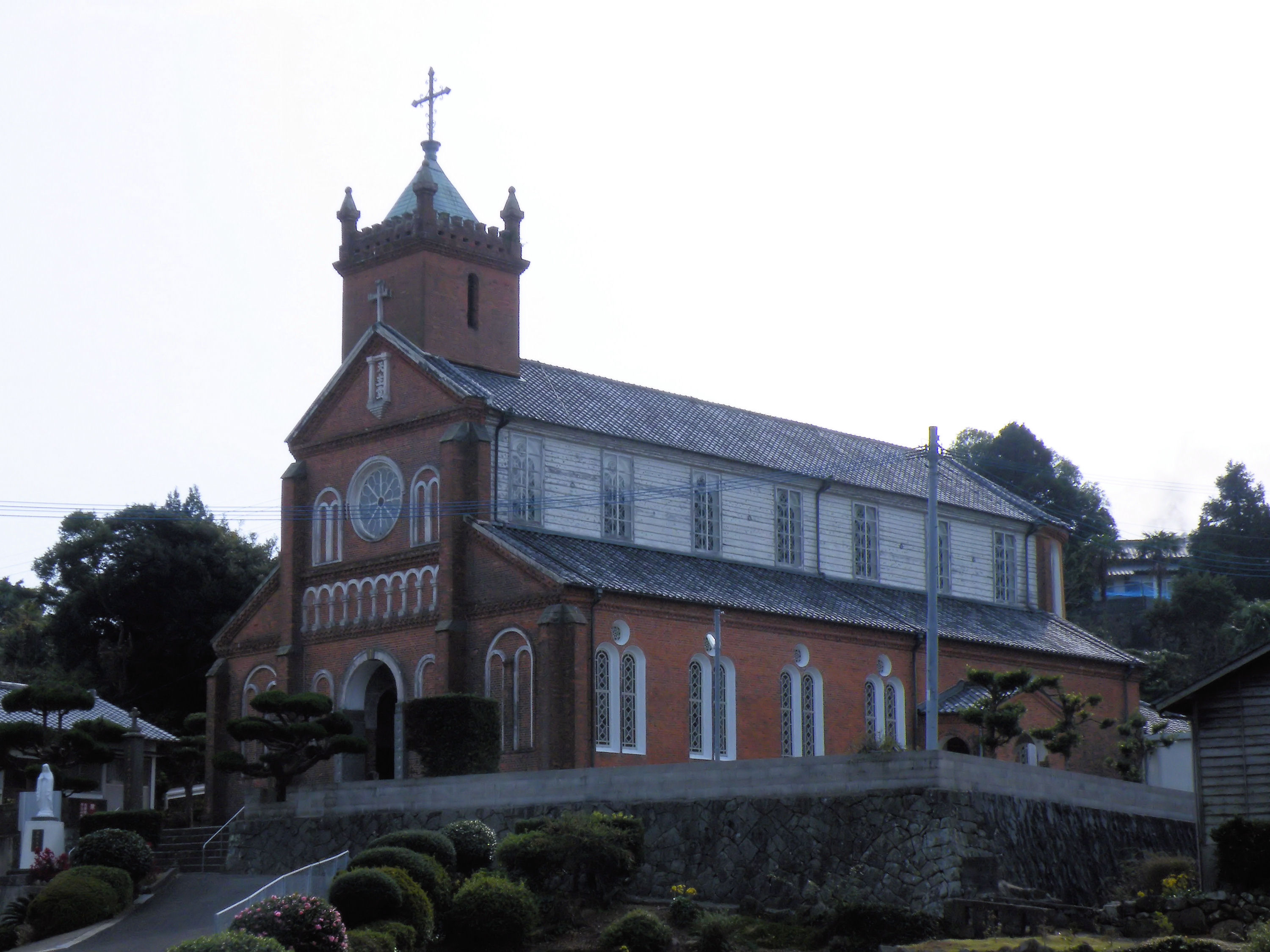 黒島天主堂（長崎県佐世保市）